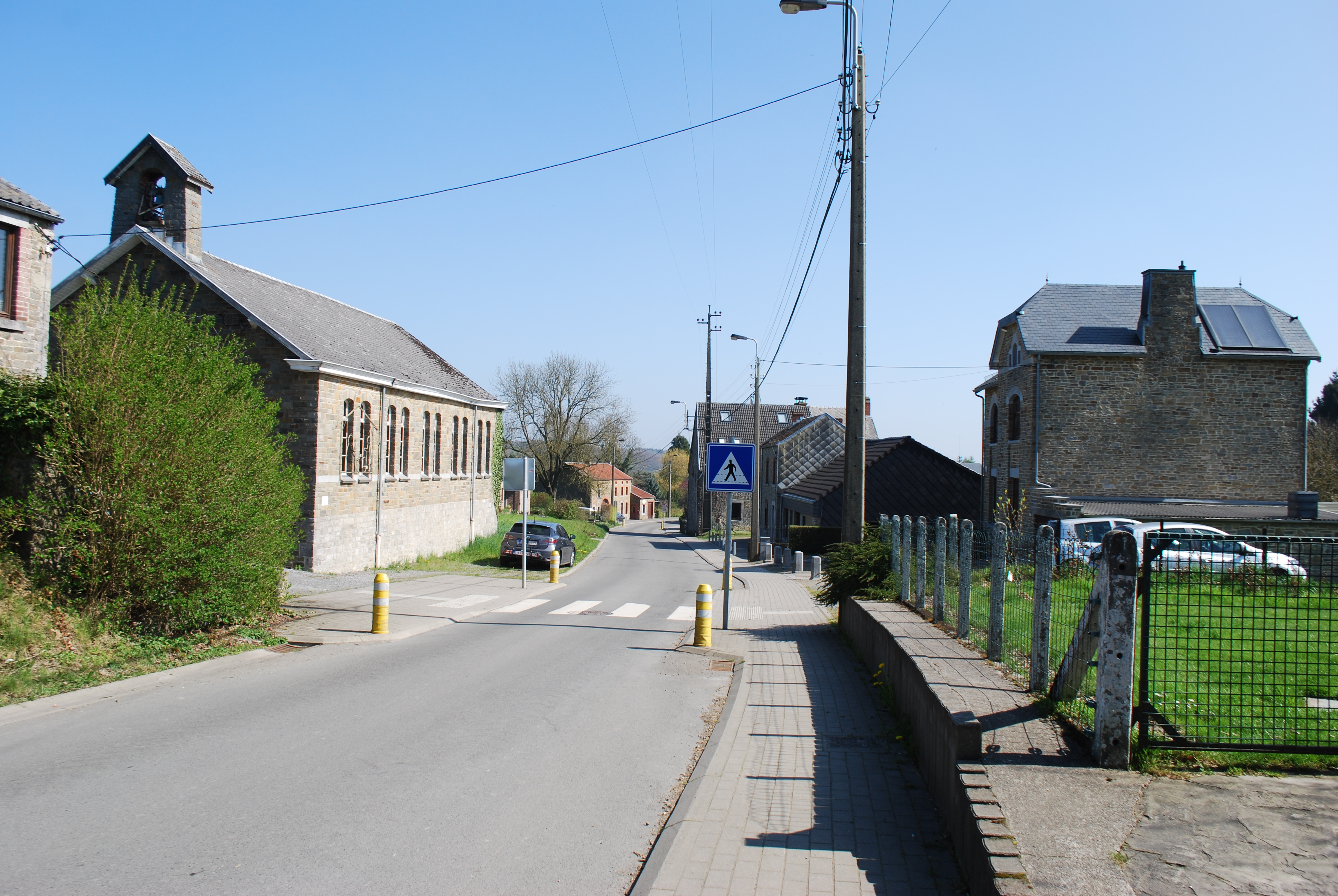 Vue du village de Villers-aux-Tours, dans la commune de Anthisnes (province de Liège, en Belgique).